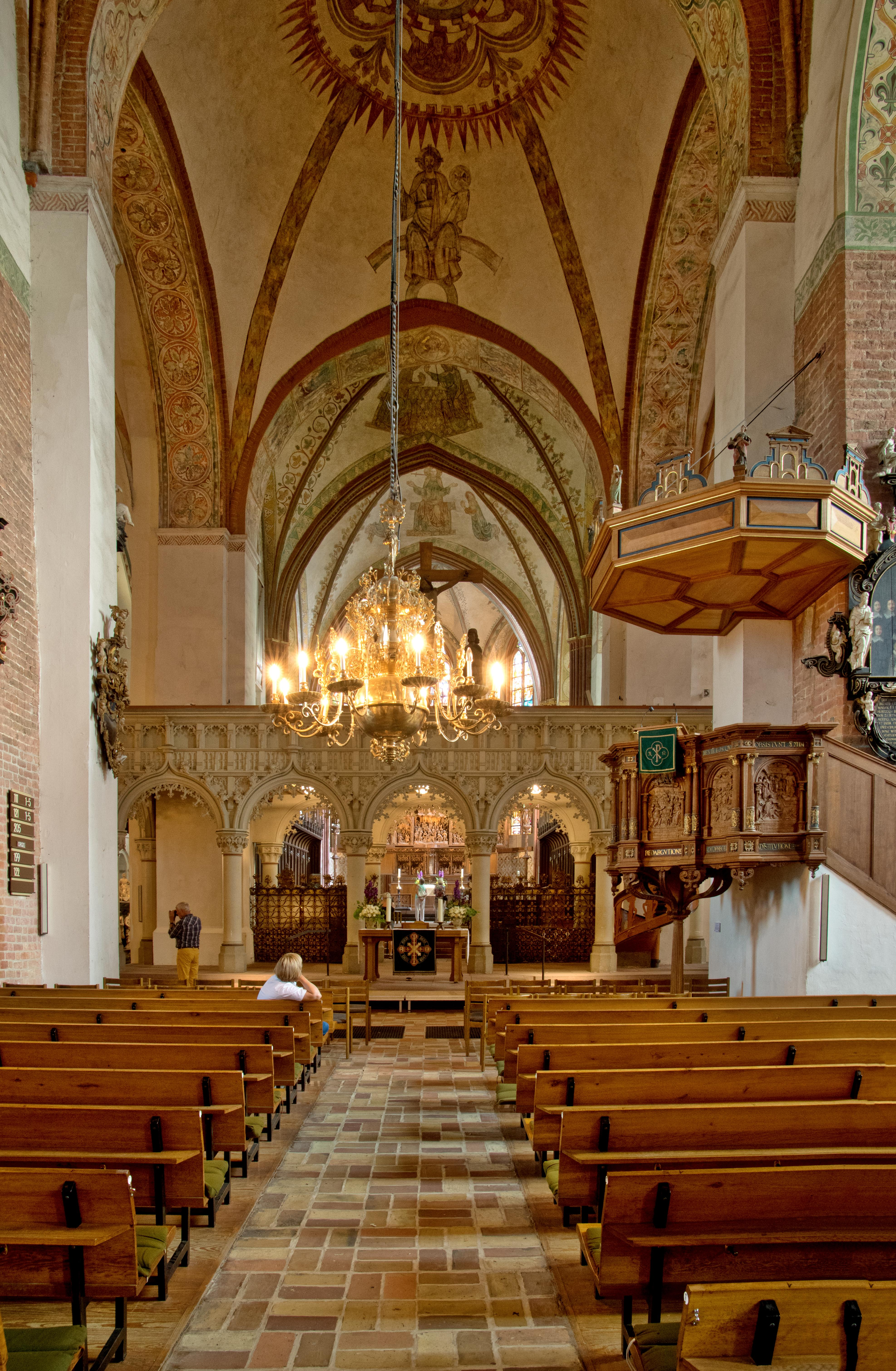 Bilder aus Schleswig Bilder aus dem Inneren Bilder vom Dom St. Petri in Schleswig